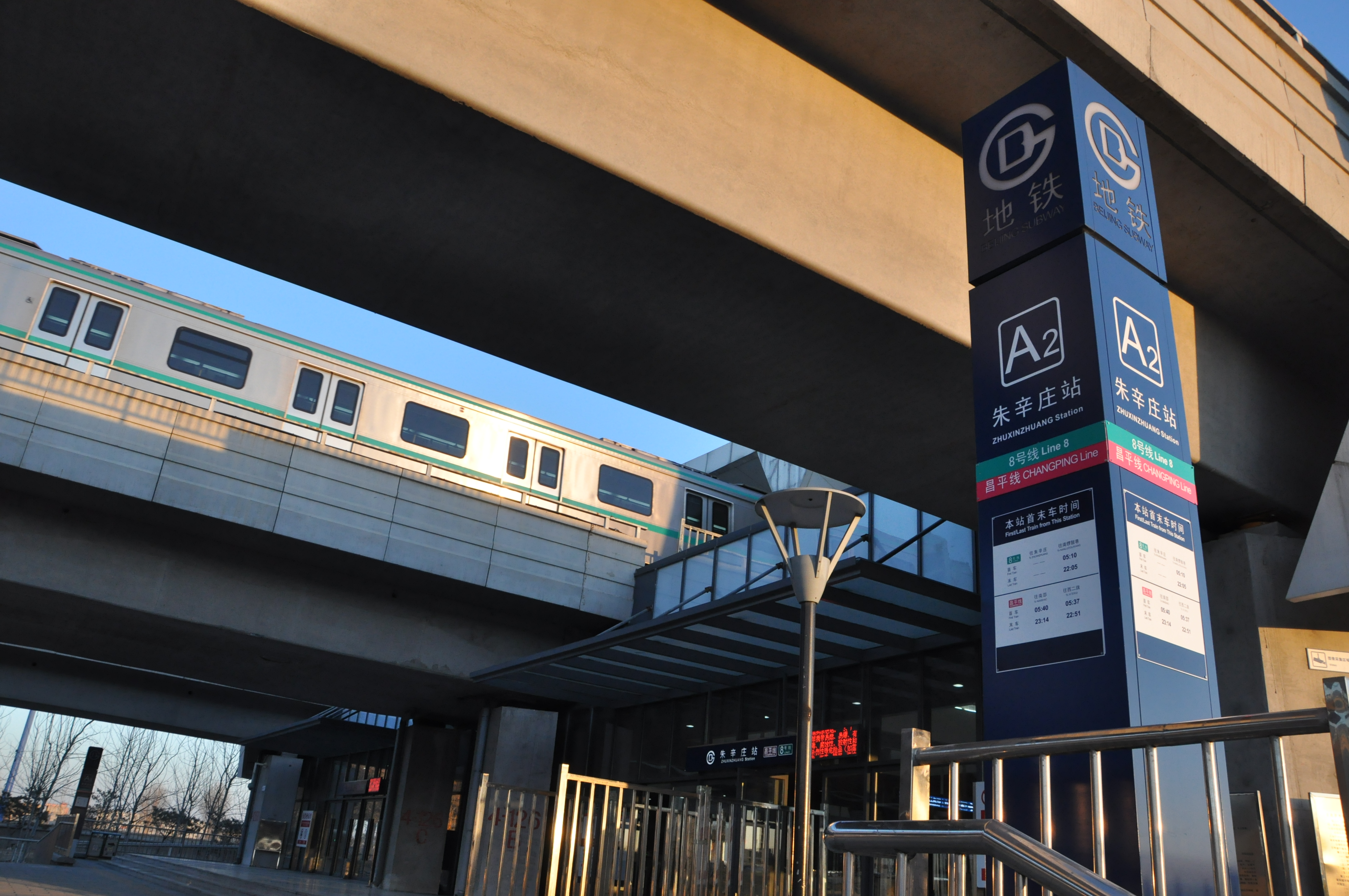 北京地铁朱辛庄站A2出口的地徽（灯柱）与后方高架桥上的列车。